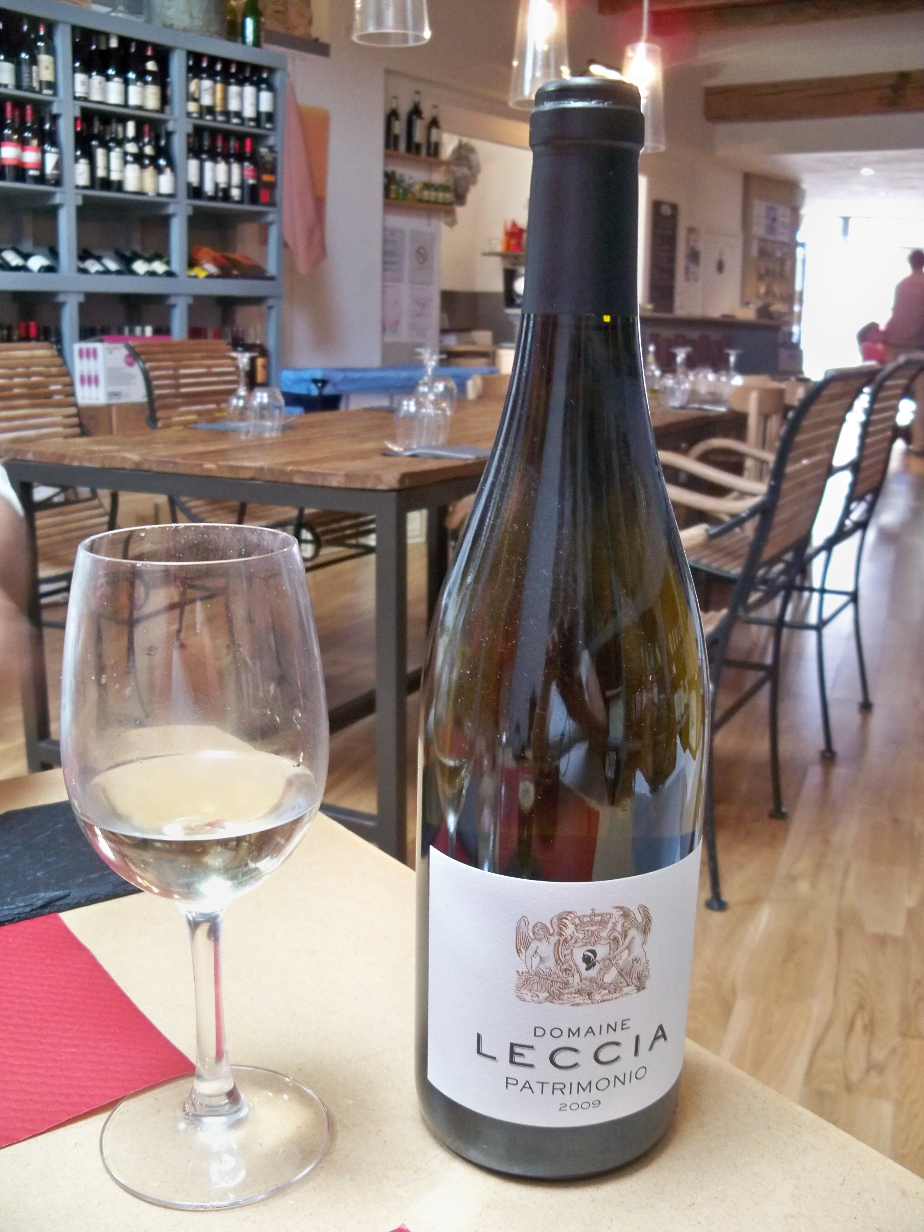 Bouteille de Vin de Patrimonio, Corse